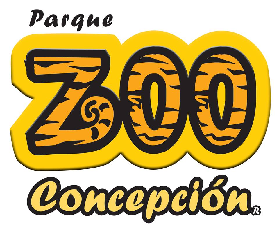 Zoológico de Concepción